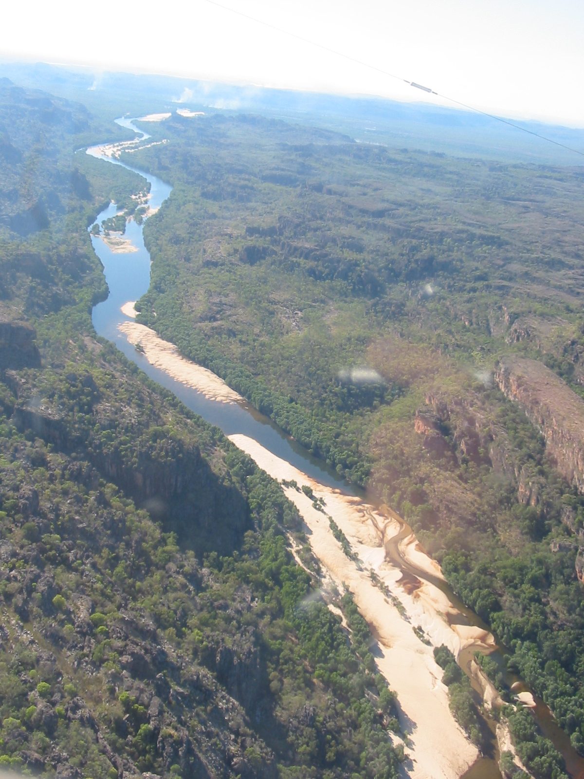 Outback am Top End zur Trockenzeit: East Alligator River (aus der Luft gesehen)